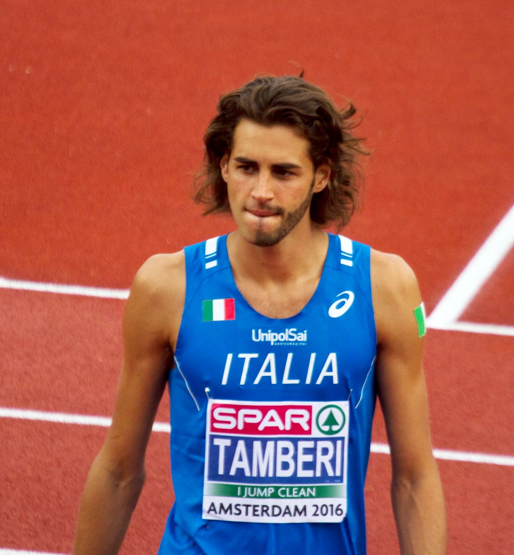 740 tamberi